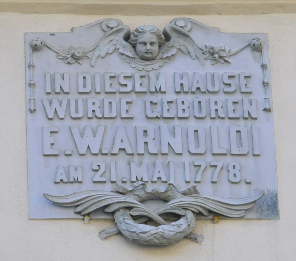 Gedenktafel am Geburtshaus von Ernst-Wilhelm Arnoldi in Gotha